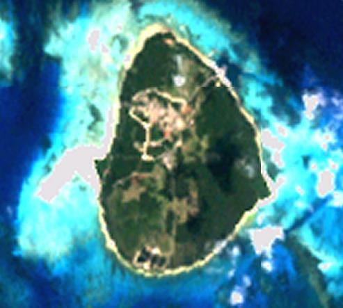 Taketomi island in Okinawa, Japan